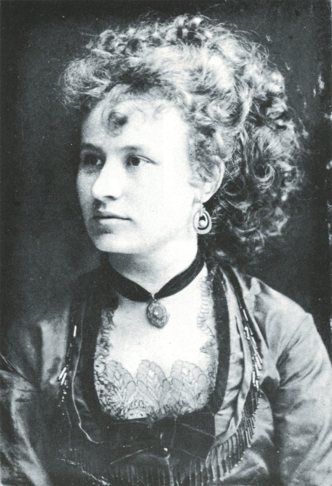 Josefina Čermáková (1849-1895), česká divadelní herečka